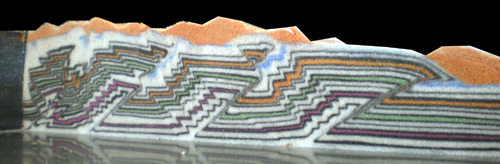 Compression d'une structure fragile pouvant représenter la croute continentale. Vue en coupe.